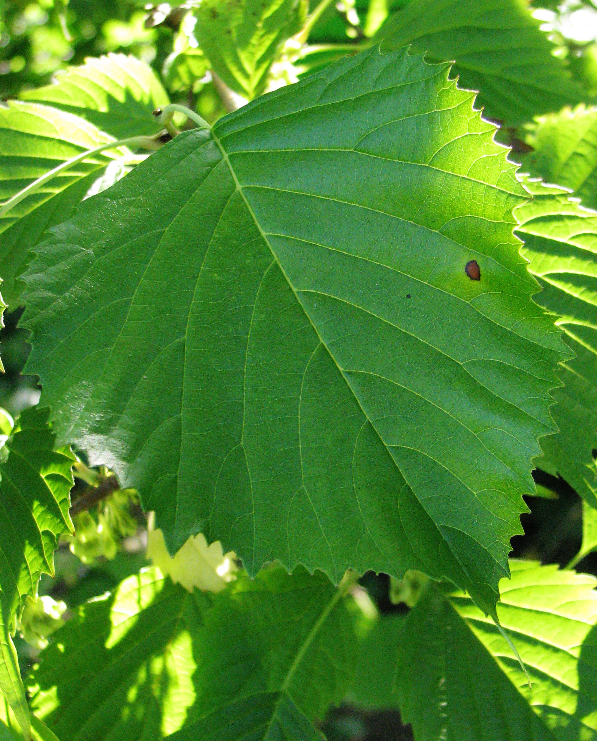 Olszanka chińska (Euptelea pleiosperma), liść, okaz uprawiany. Ogród Botaniczny Uniwersytetu Wrocławskiego, Wrocław, Polska.